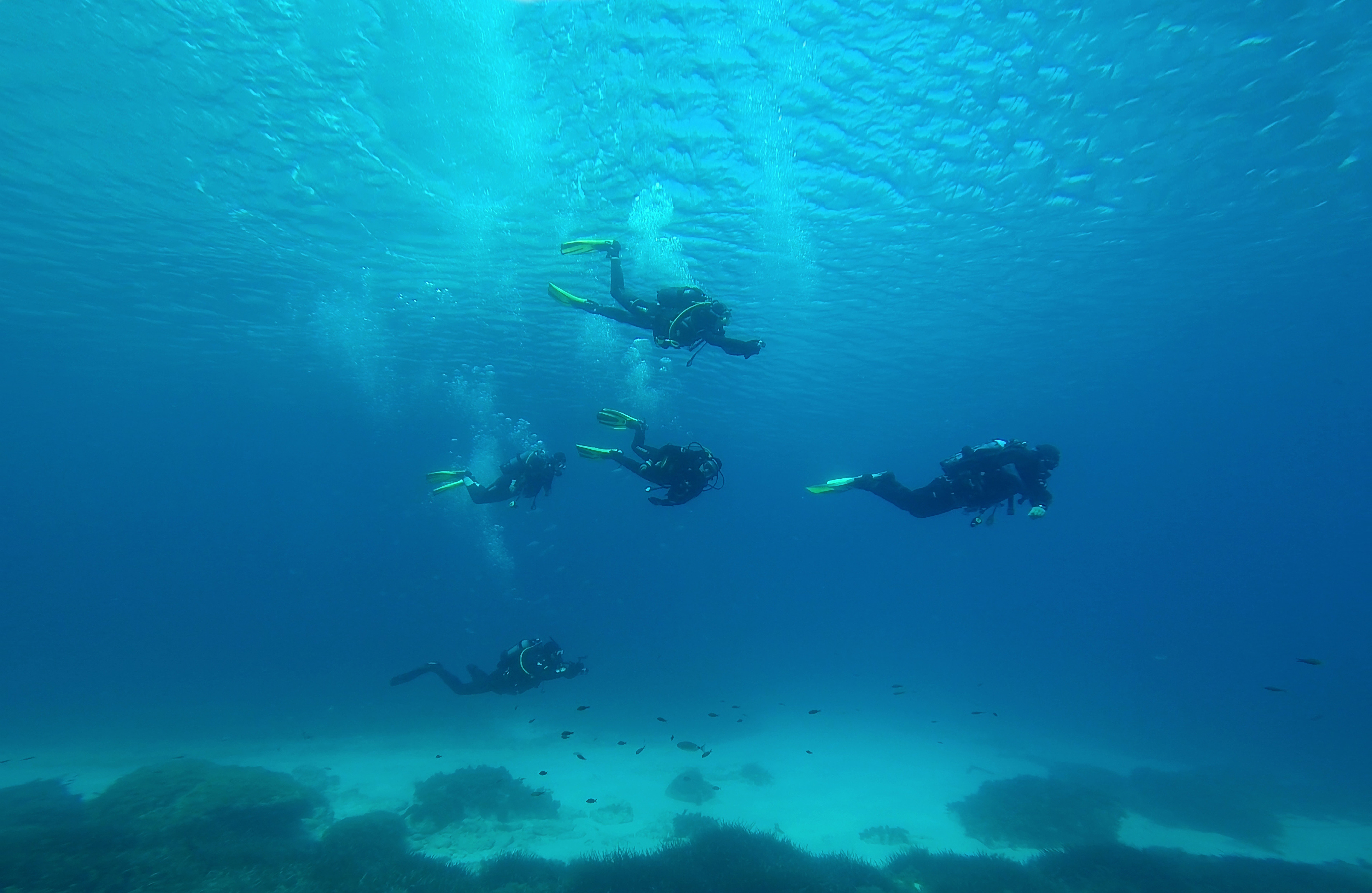 dykning